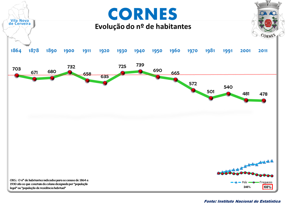 Censos 1864/2011